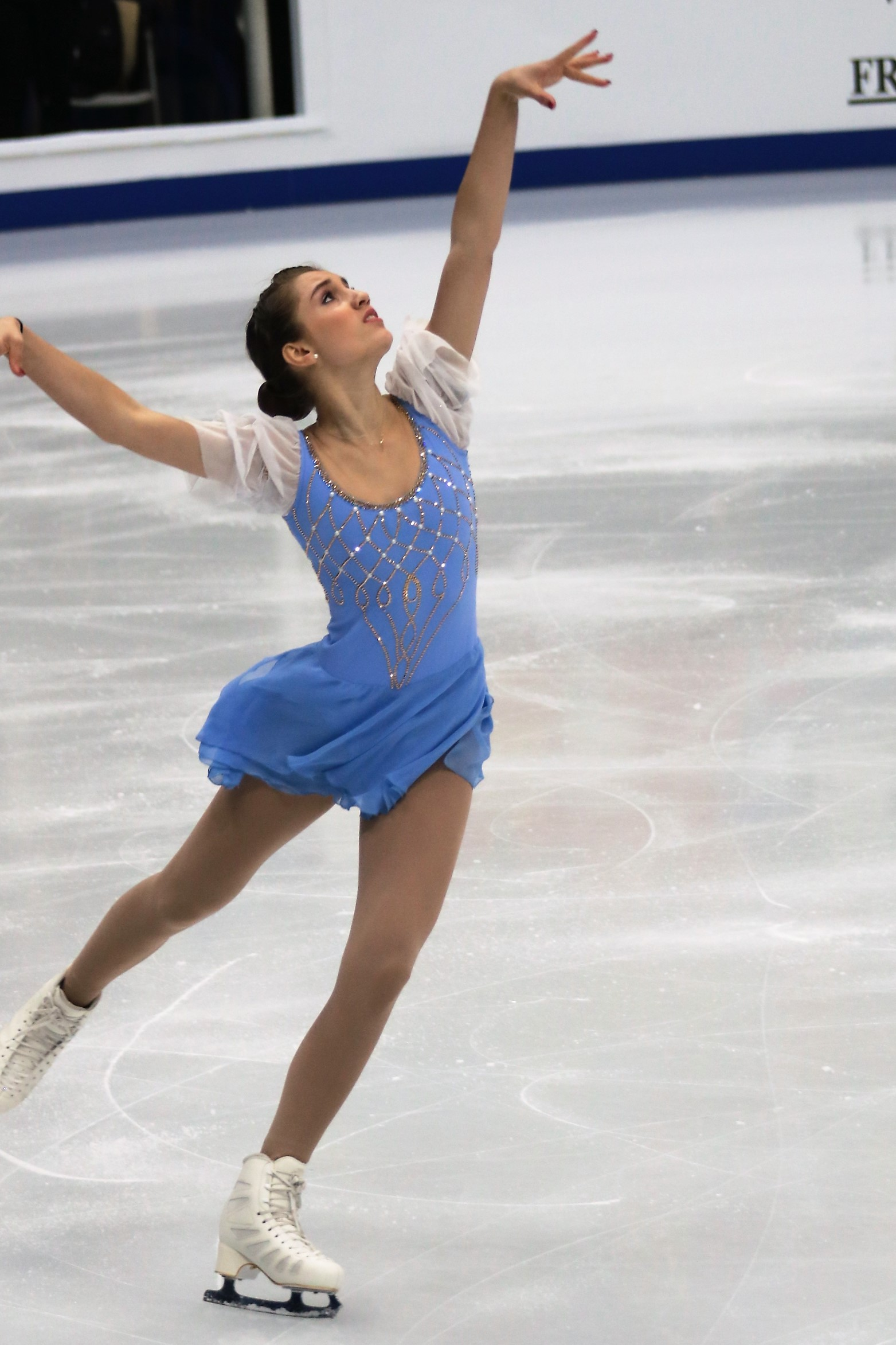 Алексия Паганини (Швейцария) на Чемпионате Европы по фигурному катанию 2018.